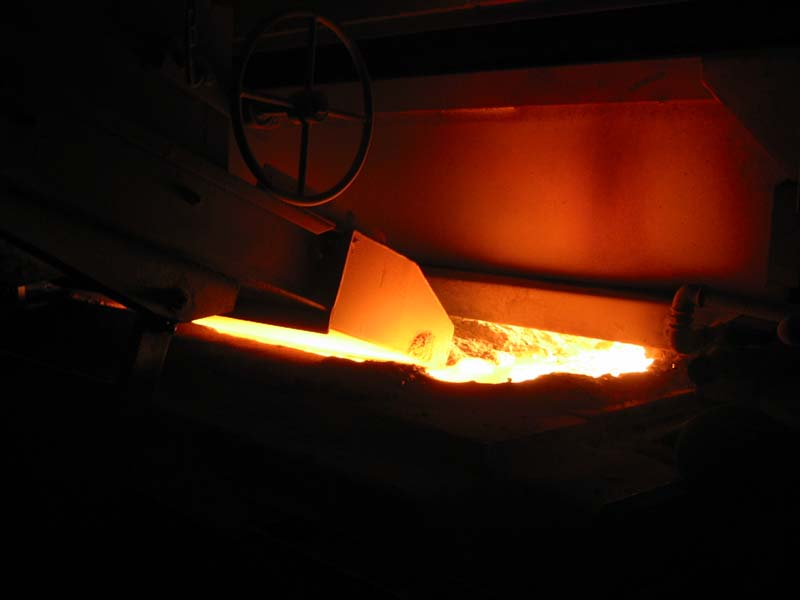 Glasproduktion, Doghouse der Schmelzwanne mit Einlegemaschine